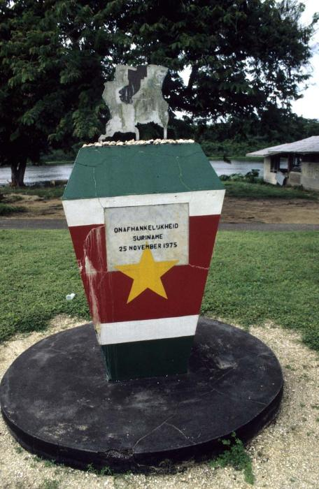 Dia. Monument ter nagedachtenis aan de Onafhankelijkheid van Suriname (25 november 1975)